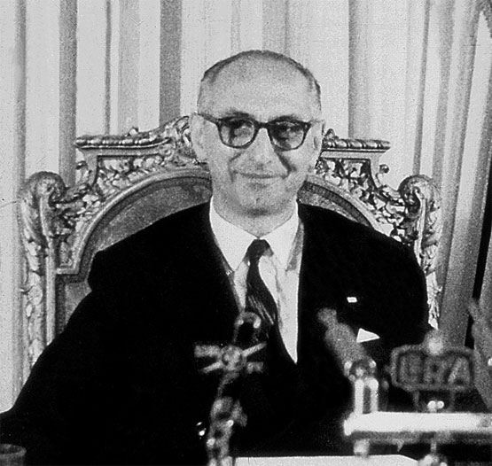 Es una foto del presidente argentino Arturo Frondizi en 1958.